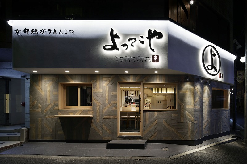 東京都渋谷区